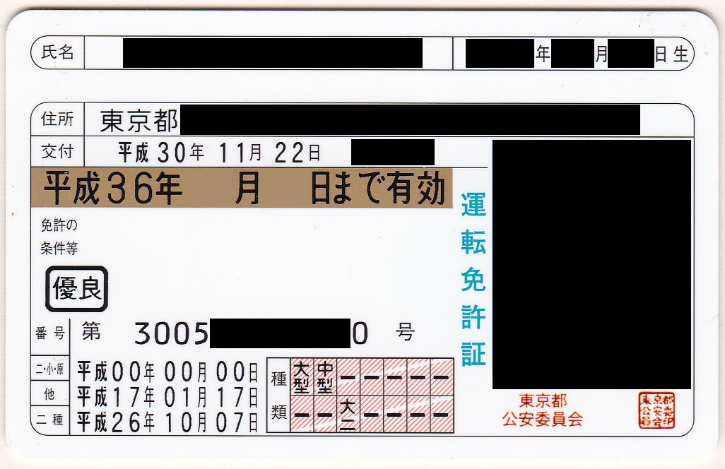 法令に依って、平成は31年4月までだが、表記上「平成36年」となっている免許証。